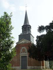 Église d'Ecquetot